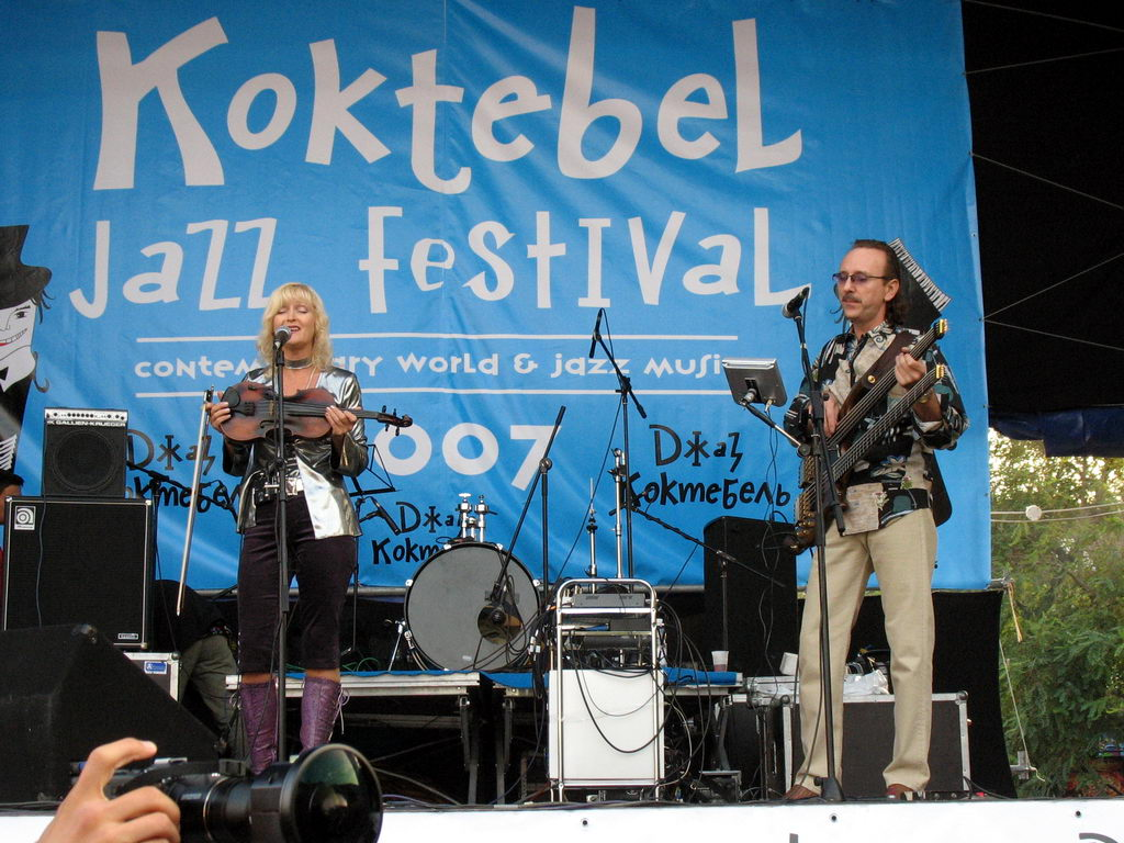 uk:?????????:??????????